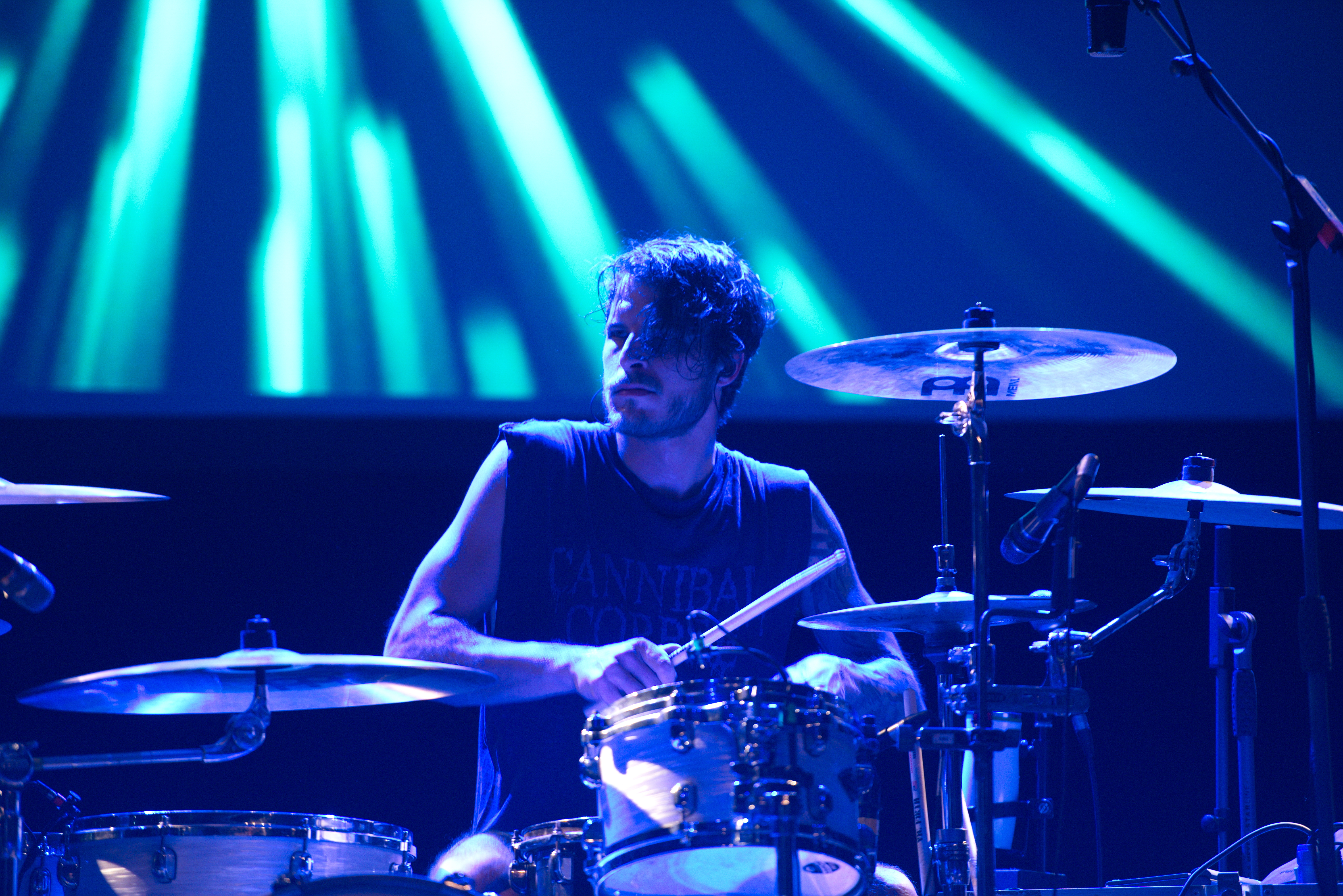 Itchy Poopzkid beim Schüler-Rockfestival 2016